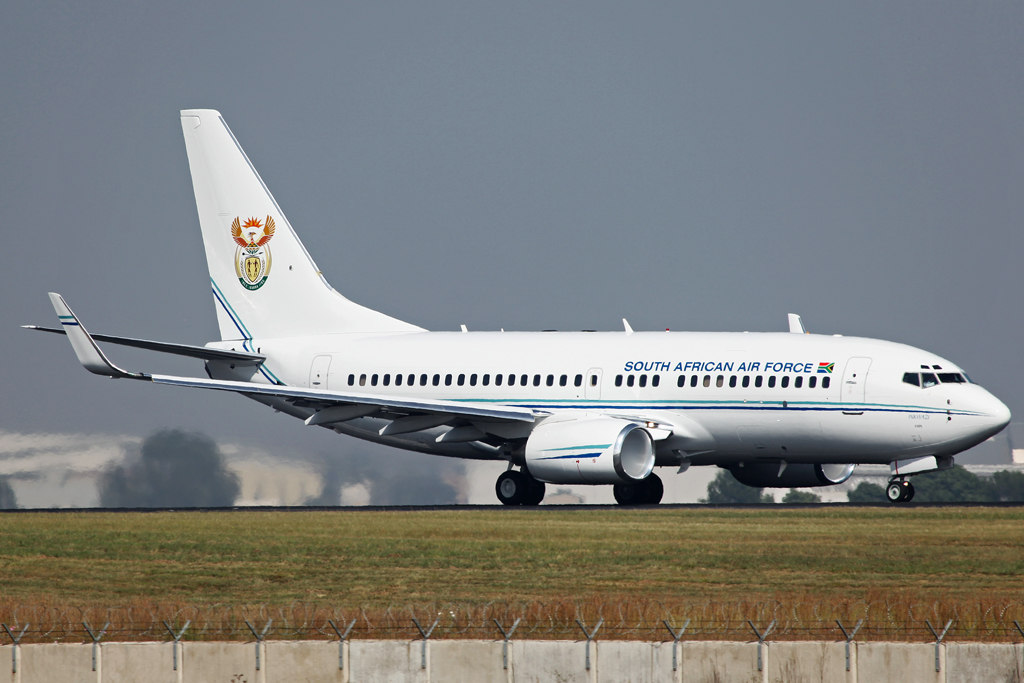 ZS-RSA B737-700 SAF